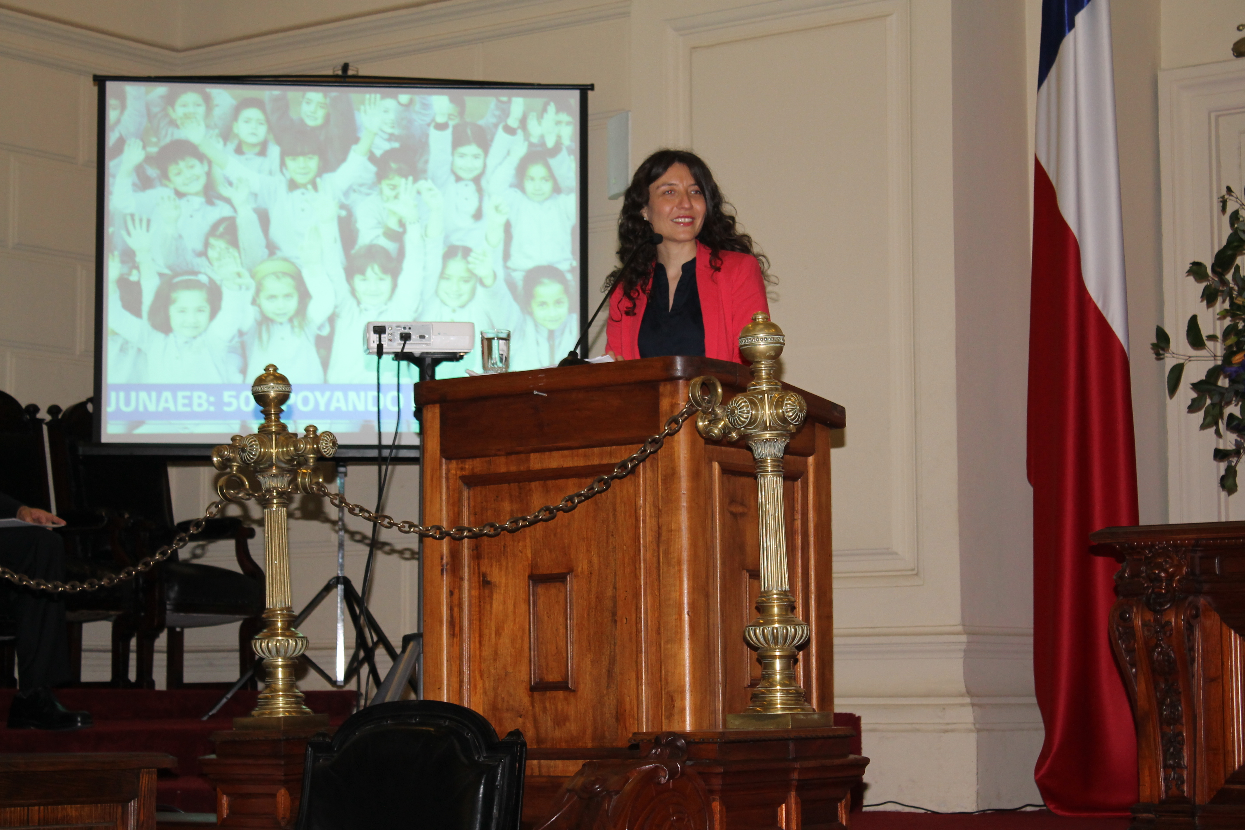 Subsecretaria de Educación, Valentina Quiroga.